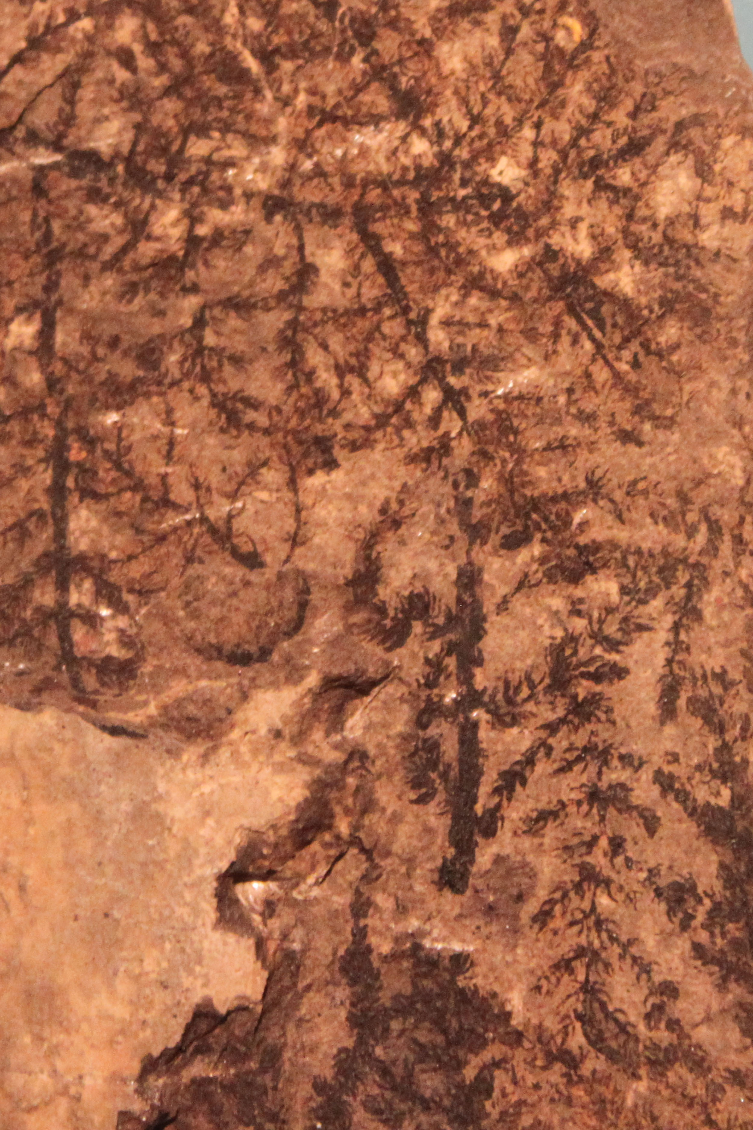 Fósil del vegetal del Cretácico inferior Montsechia vidalii del yacimiento de Las Hoyas, Serranía de Cuenca. Museo de Ciencias naturales de Valencia, Comunidad valenciana, España.